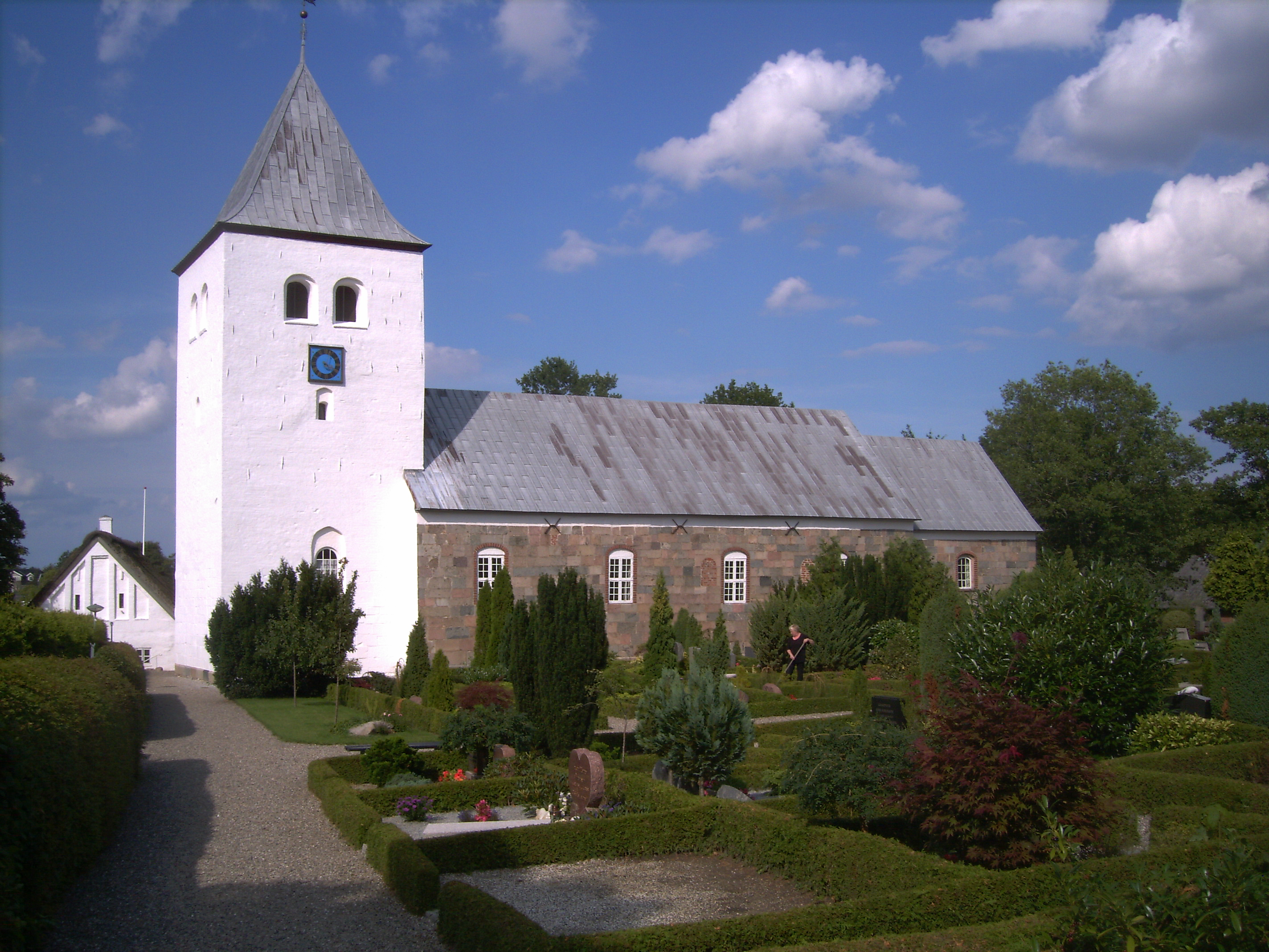 Ørsted Kirke,Rougsø Kommune